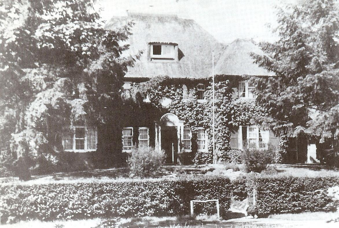 Villa Oldeheuvel in Bussum, geboortehuis van Paul Biegel, in 1936